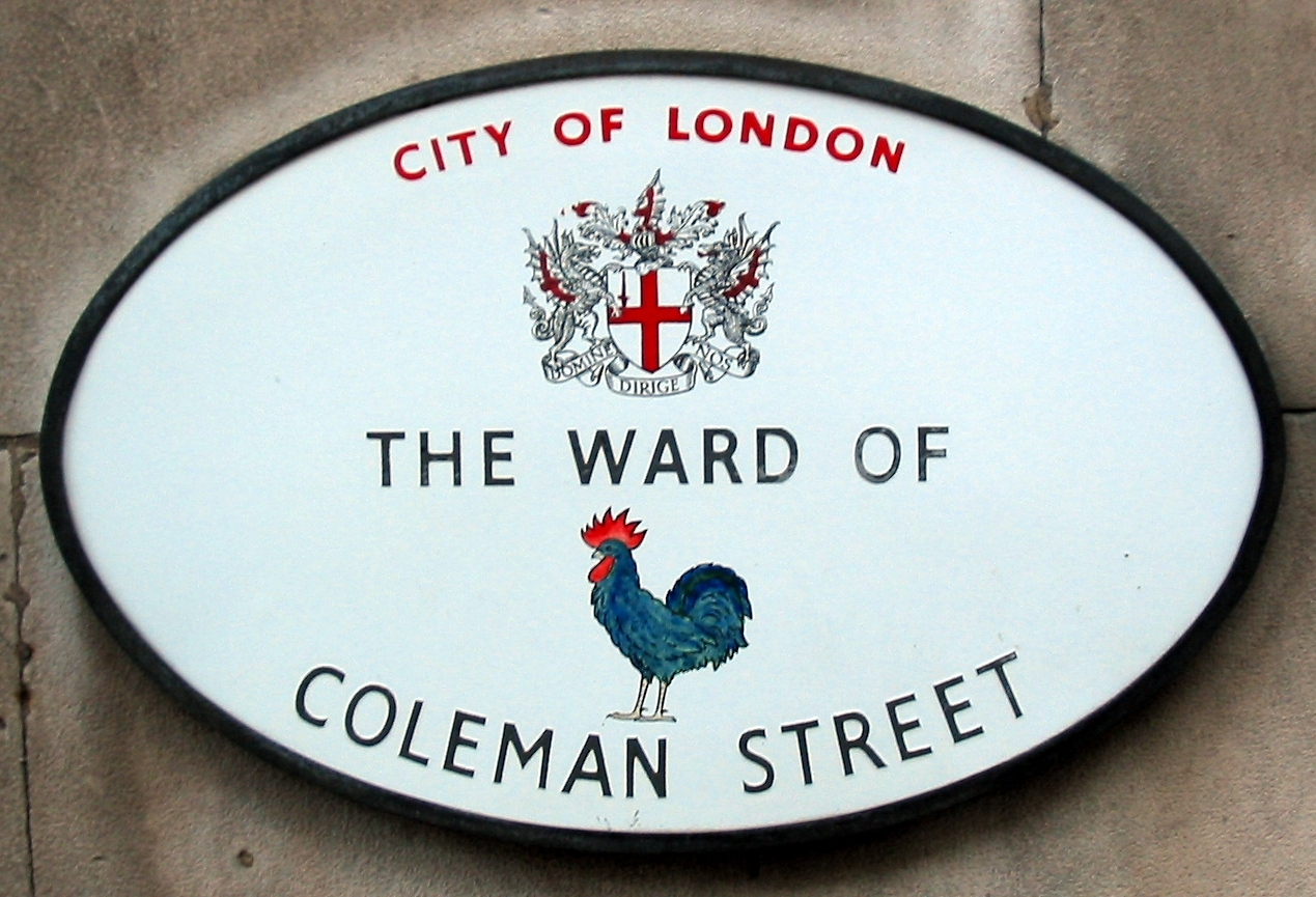 Nrf: Pliaque à Londres